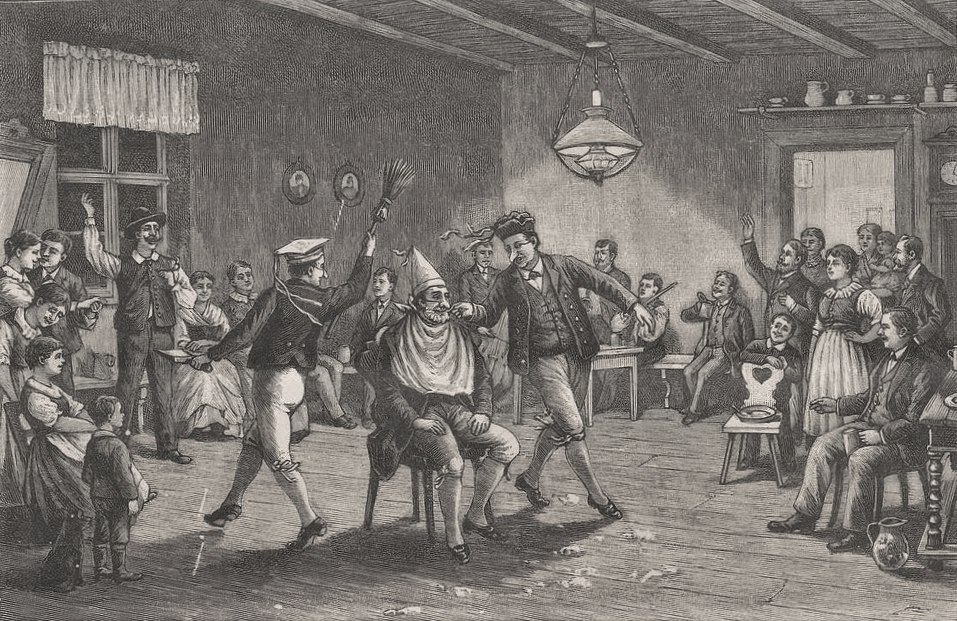 Der Barbiertanz (Volksbrauch in Pommern), Holzstich, 1893